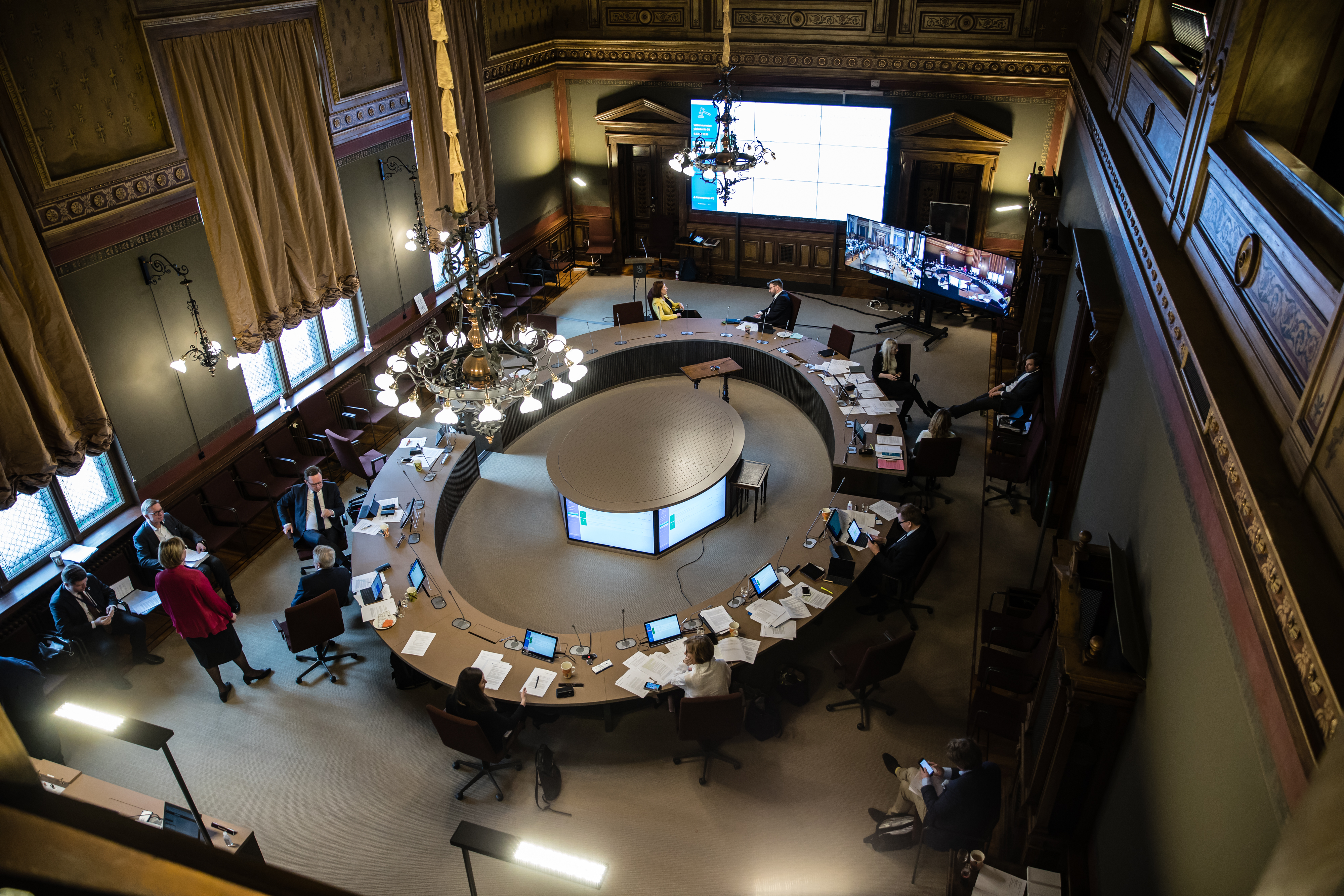 © Laura Kotila | valtioneuvoston kanslia